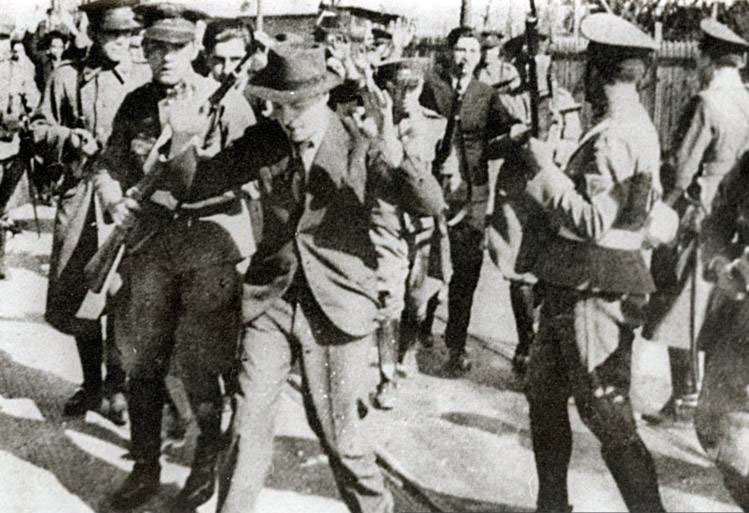 En Chile: Masacre del Seguro Obrero, 5 de Septiembre de 1938, nazis escoltados por policías.